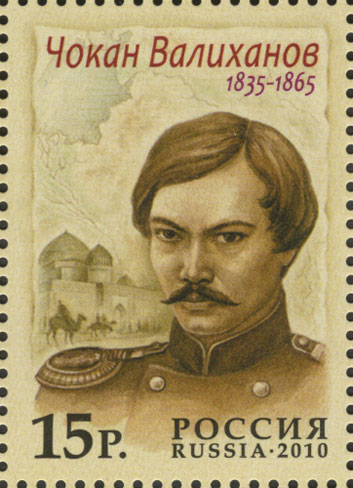 Совместный выпуск. Россия - Казахстан. Исследователи. Чокан Валиханов (1835-1865).